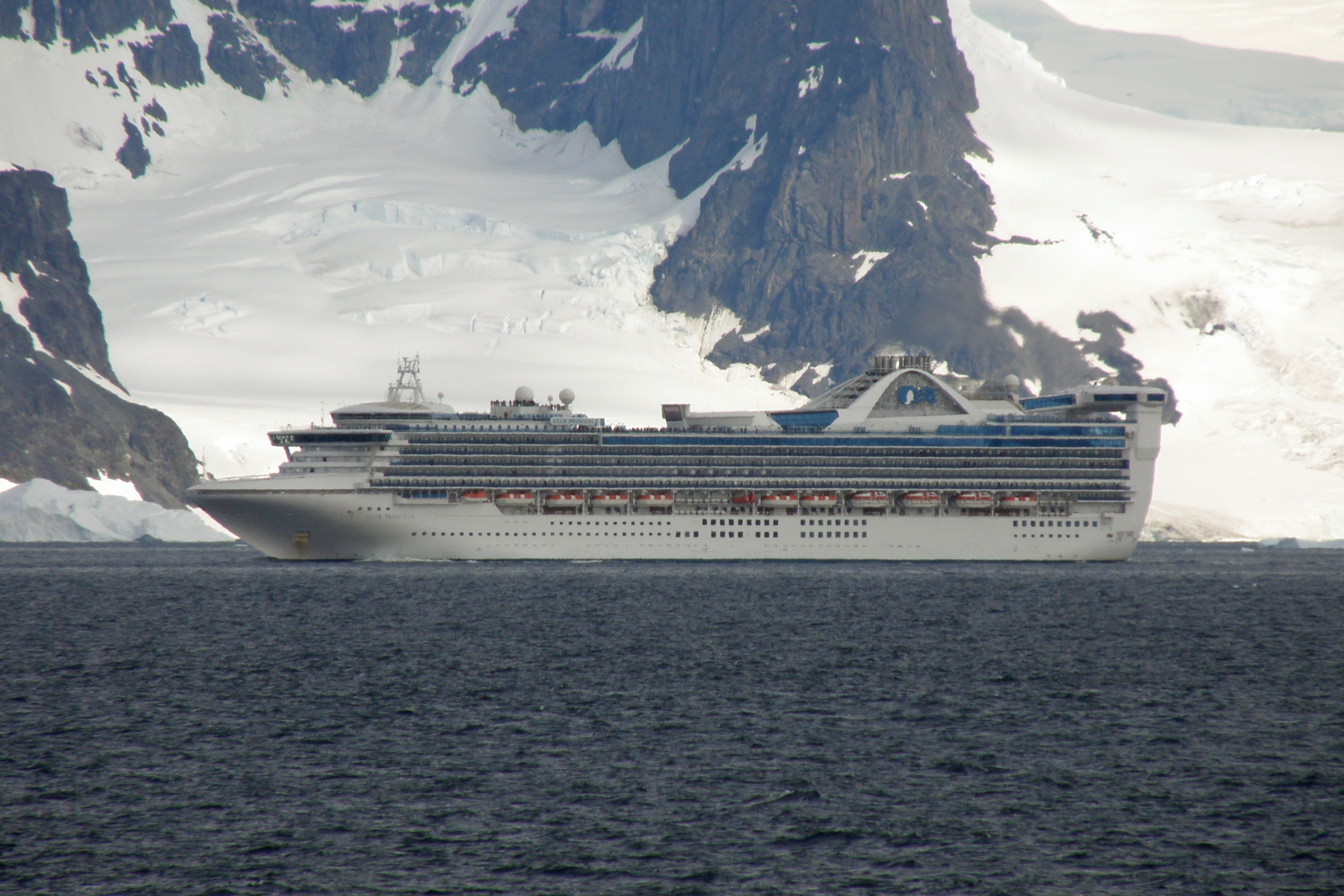 Rencontre avec le Star Princess dans le détroit de Gerlache (Péninsule antarctique) en février 2010.